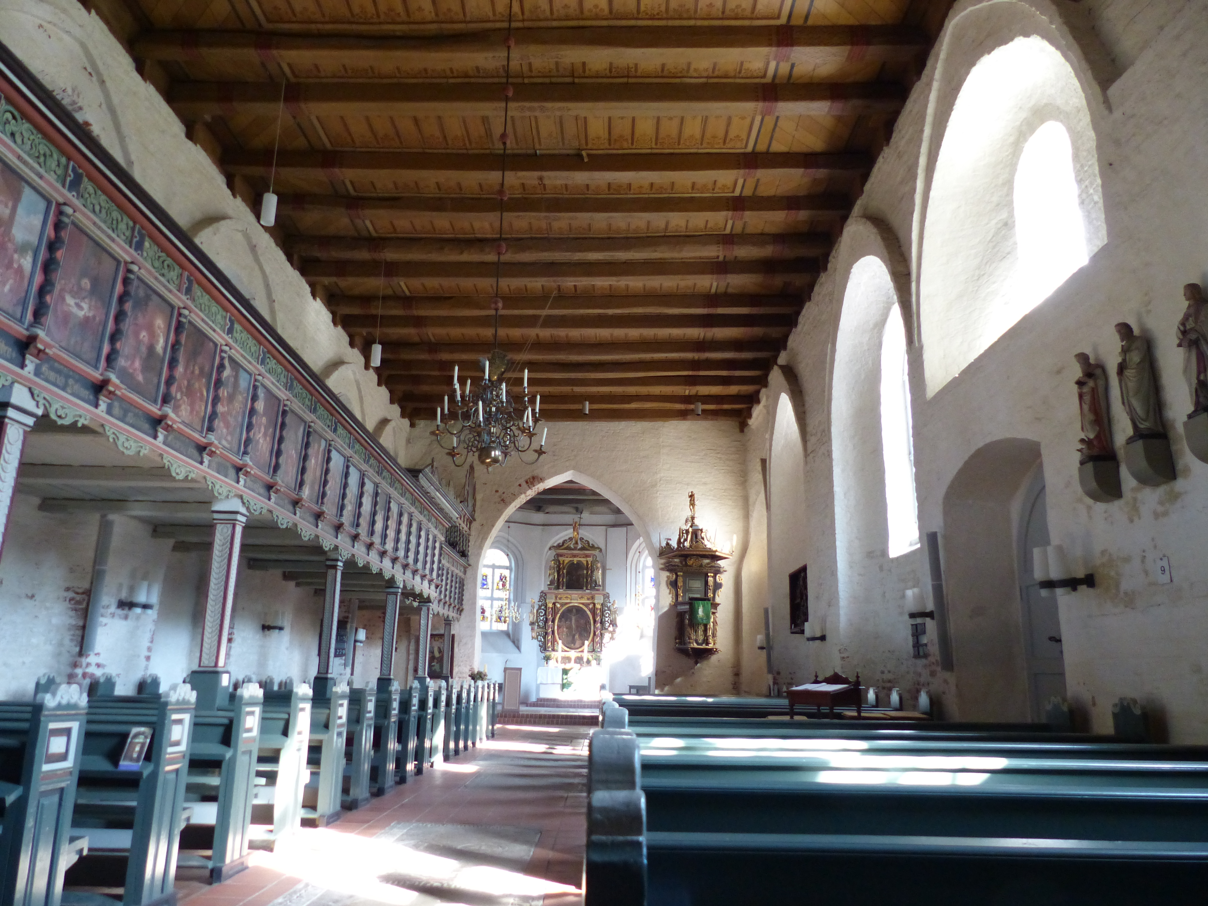 Dorfkirche Golzwarden, Innenraum nach Osten